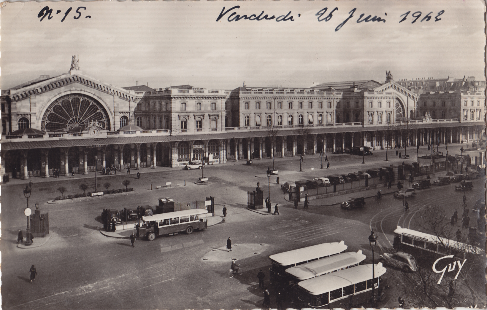 Carte postale semi-moderne éditée par Guy, n°369 :PARIS